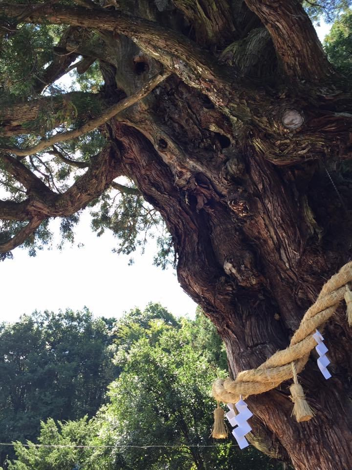 瑞浪市大湫の神明神社大杉（2017年9月）